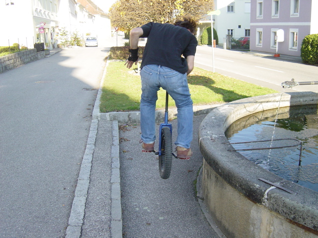 Einradfahrer beim Pedalgrab an einem Brunnen. Beim Pedalgrab hängt sich der Fahrer mit dem Pedal am Objekt fest, und springt erst dann auf das Objekt. Dadurch kann der Trialer um ca. 25cm höher springen. Quelle: Selbst fotografiert / Selbst der Fahrer